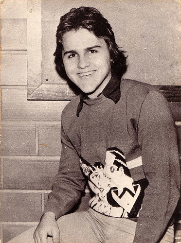 Geddel Vieira Lima aos 16 anos de idade